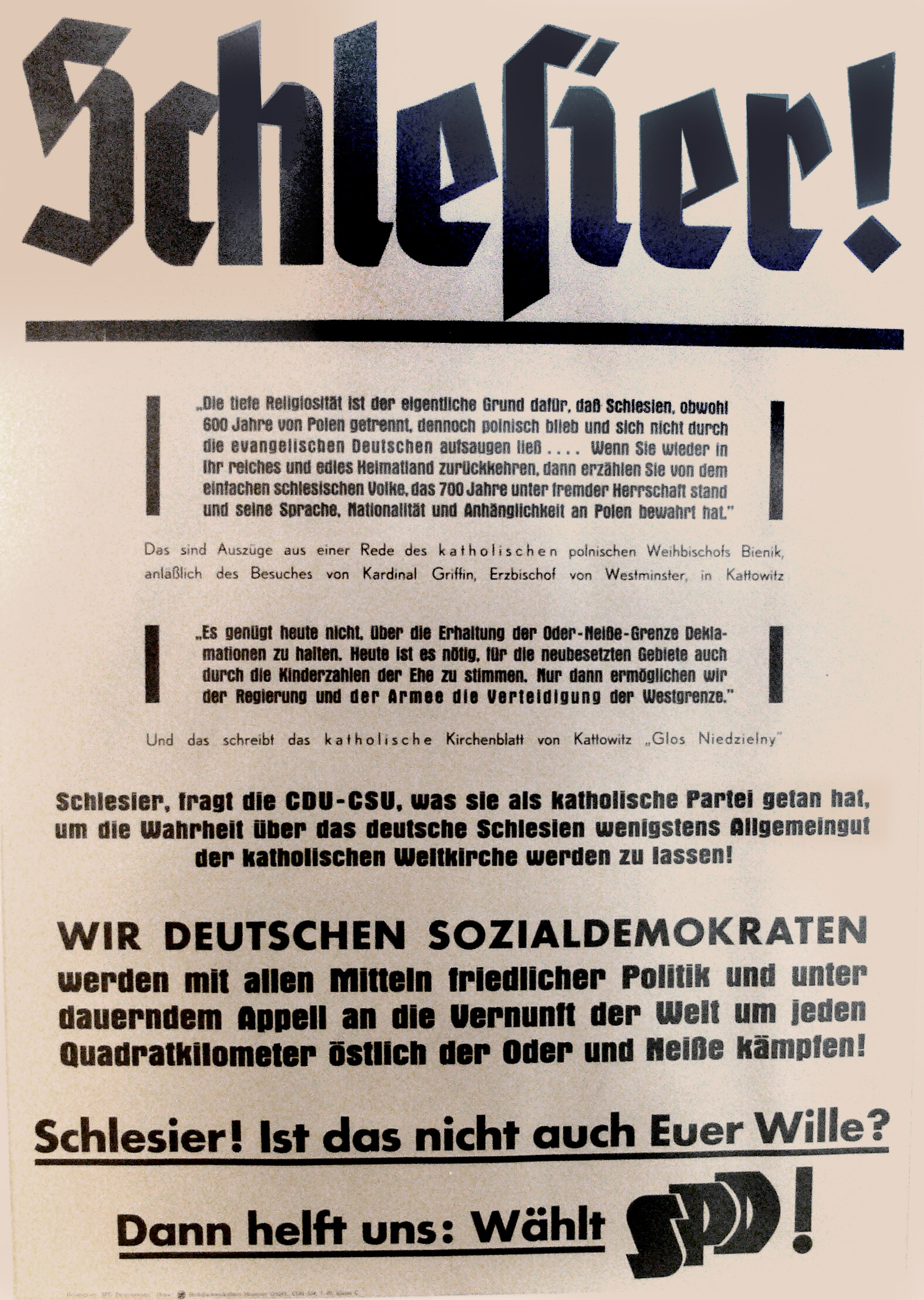 Wahlplakat der SPD für die Bundestagswahl 1949, das sich an die heimatvertriebenen Schlesier wendet